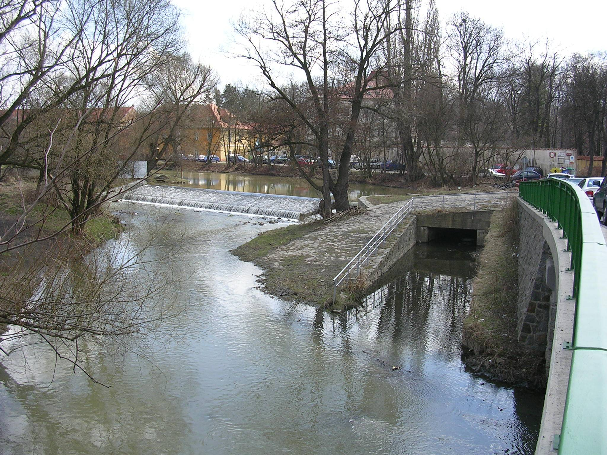 Czech Republic, Praha 10, Záběhlice: splav na Botiči, v pozadí ulice Za potokem a záběhlický zámek